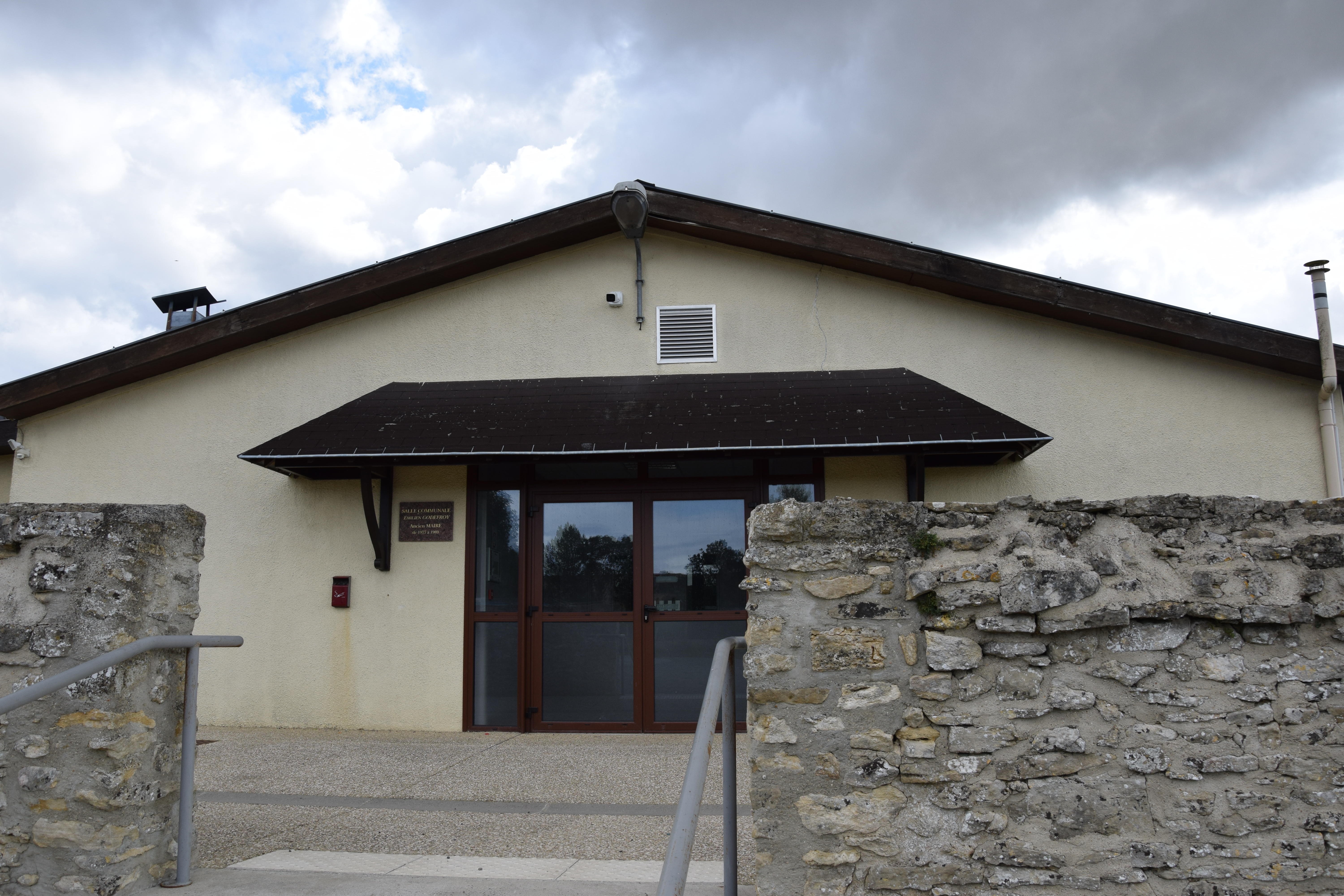 Saint-Quentin-des-Prés salle des fetes